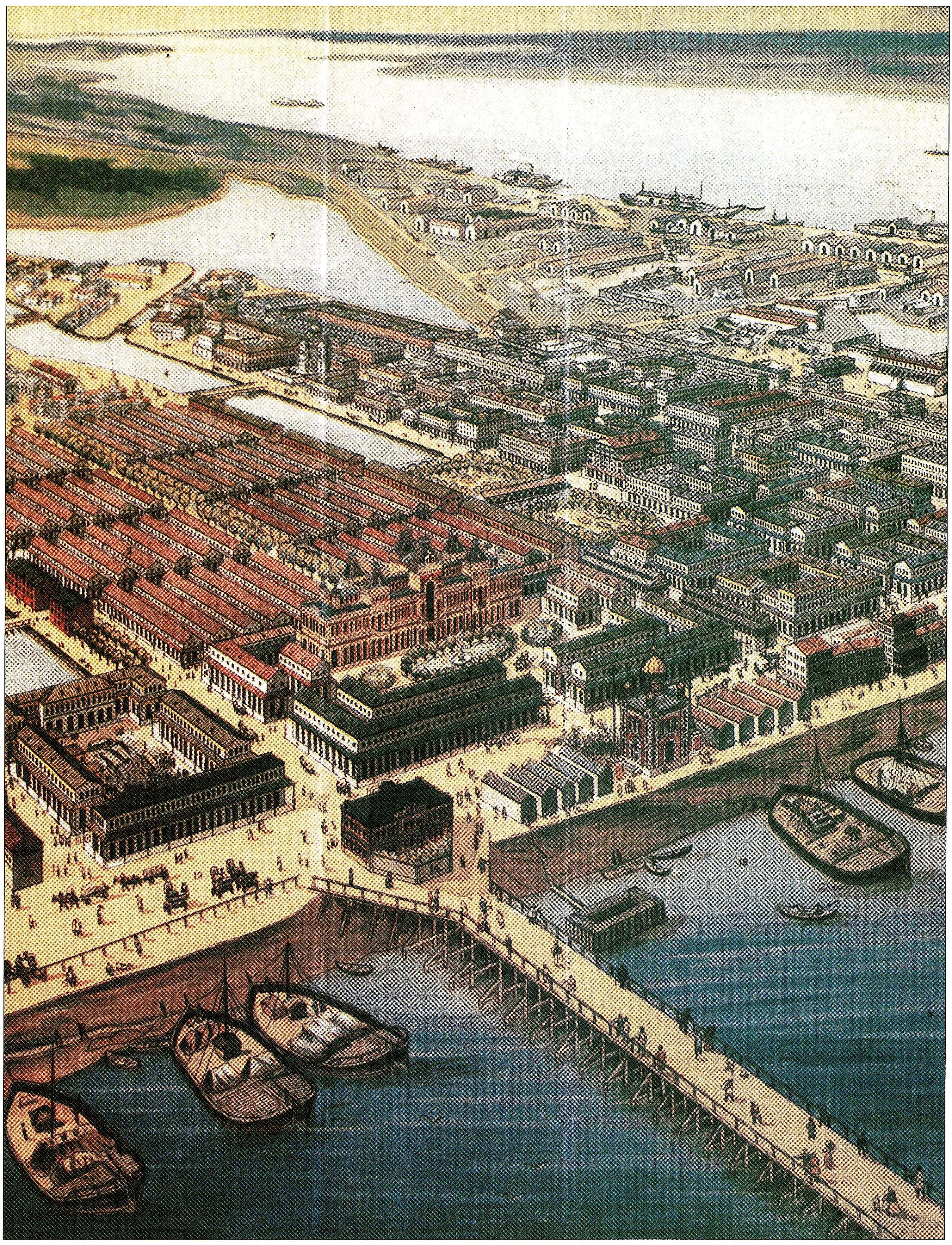 Общий вид Нижегородской ярмарки с птичьего полёта и Нижегородский Гостиный двор. Хромолитография 1896 г. (фрагмент). В центре - главное здание ярмарки в русском стиле, построенное в 1889-90 гг.